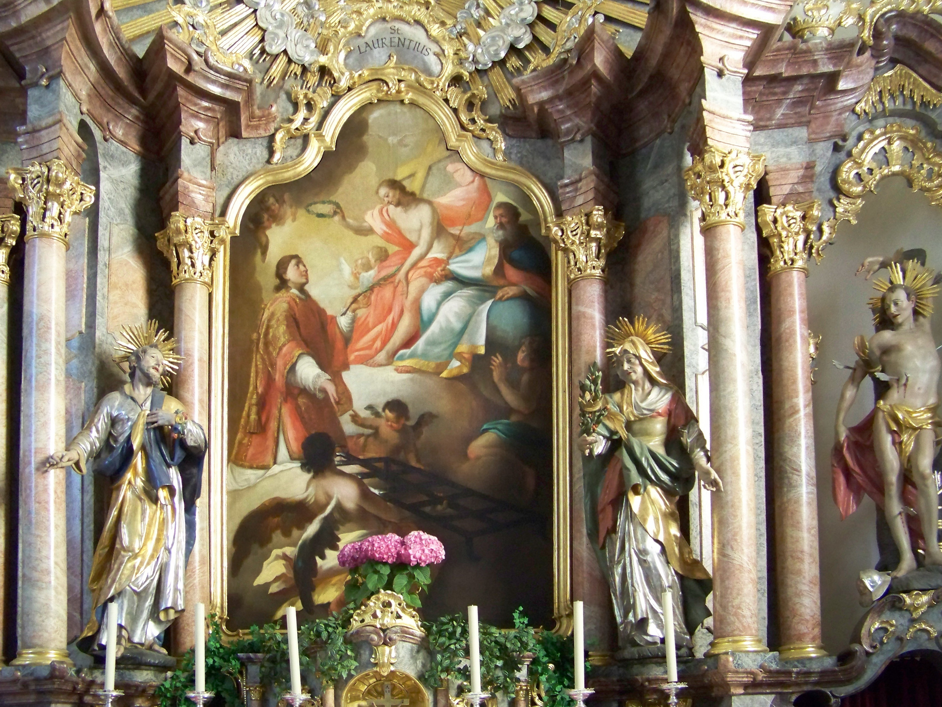 Unterneuhausen, Kirchweg 9. Saalkirche mit Westturm, barocke Anlage von 1741. Das Altarblatt zeigt den Kirchenpatron St. Laurentius in seiner Glorie.